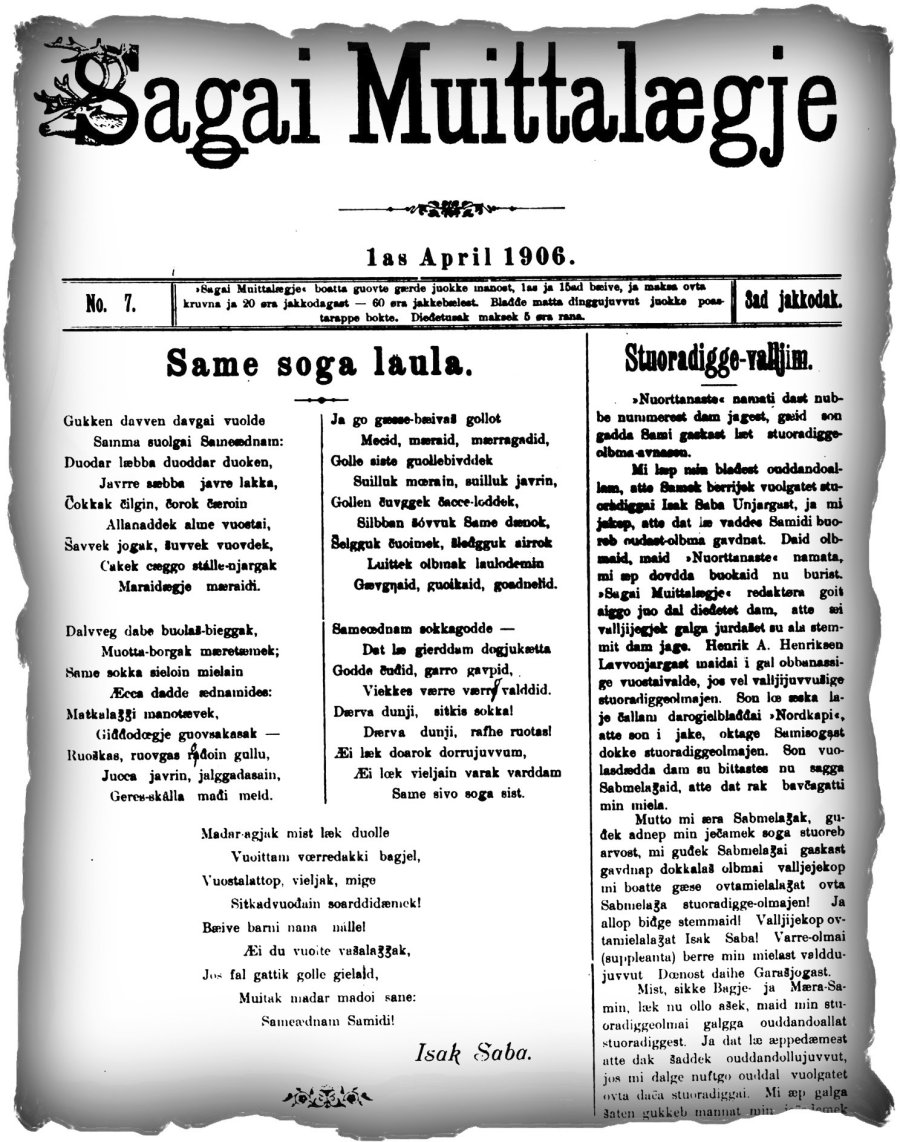 Саамская газета Sagai Muittalægje